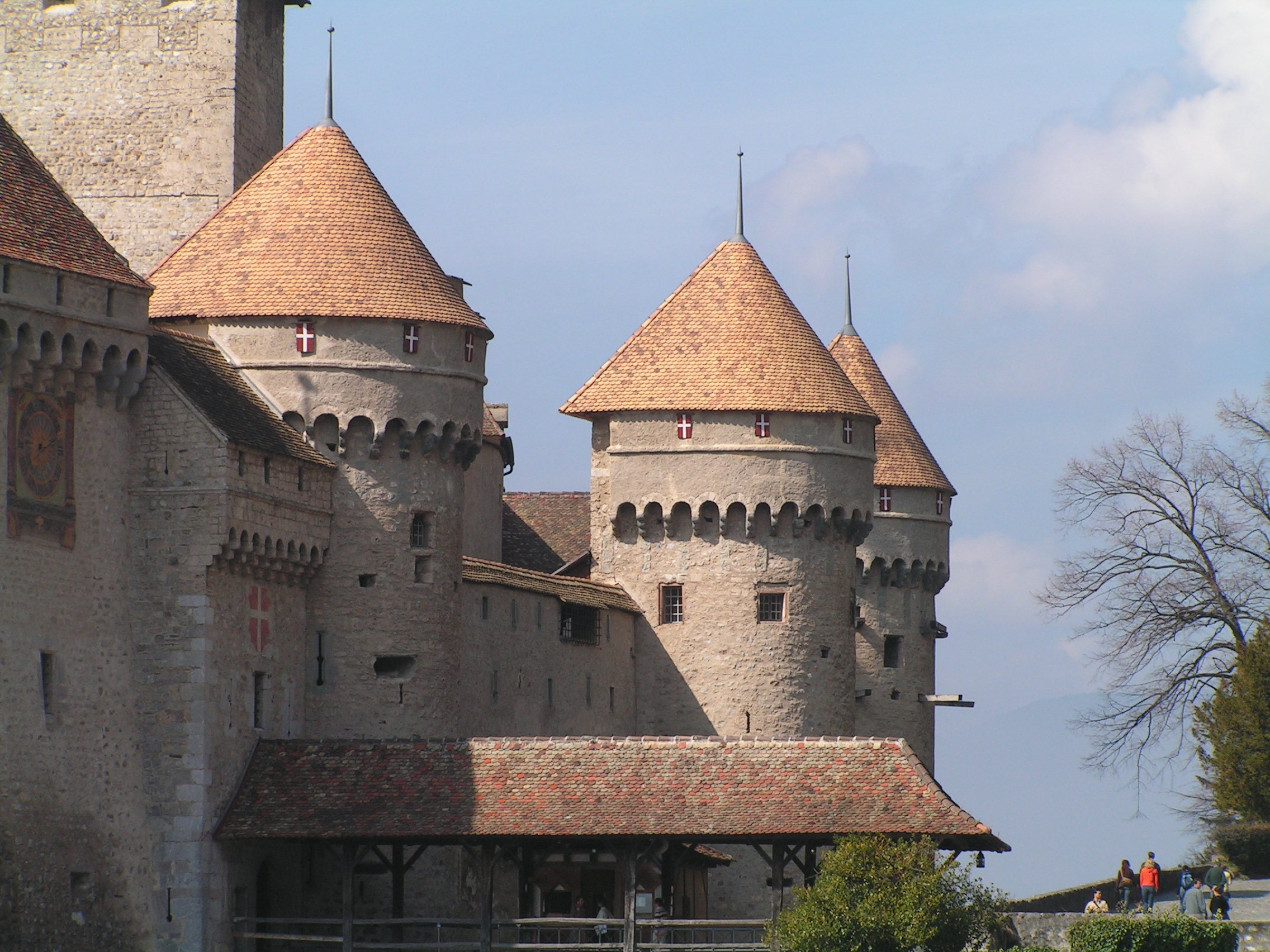 Teilansicht Schloss Chillon, Veytaux-Montreux, Schweiz